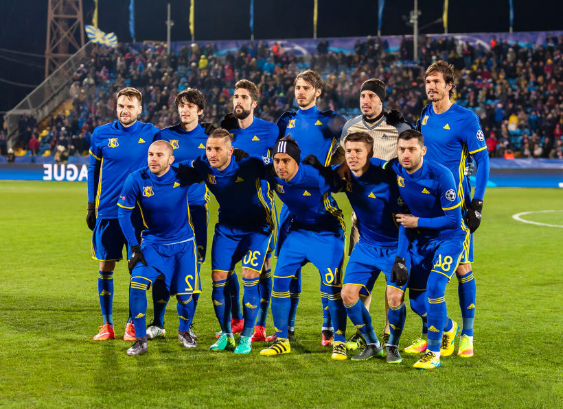 23.11.2016. Россия, Ростов-на-Дону, стадион «Олимп-2». Лига Чемпионов УЕФА групповой этап, «Ростов» — «Бавария (Мюнхен)».